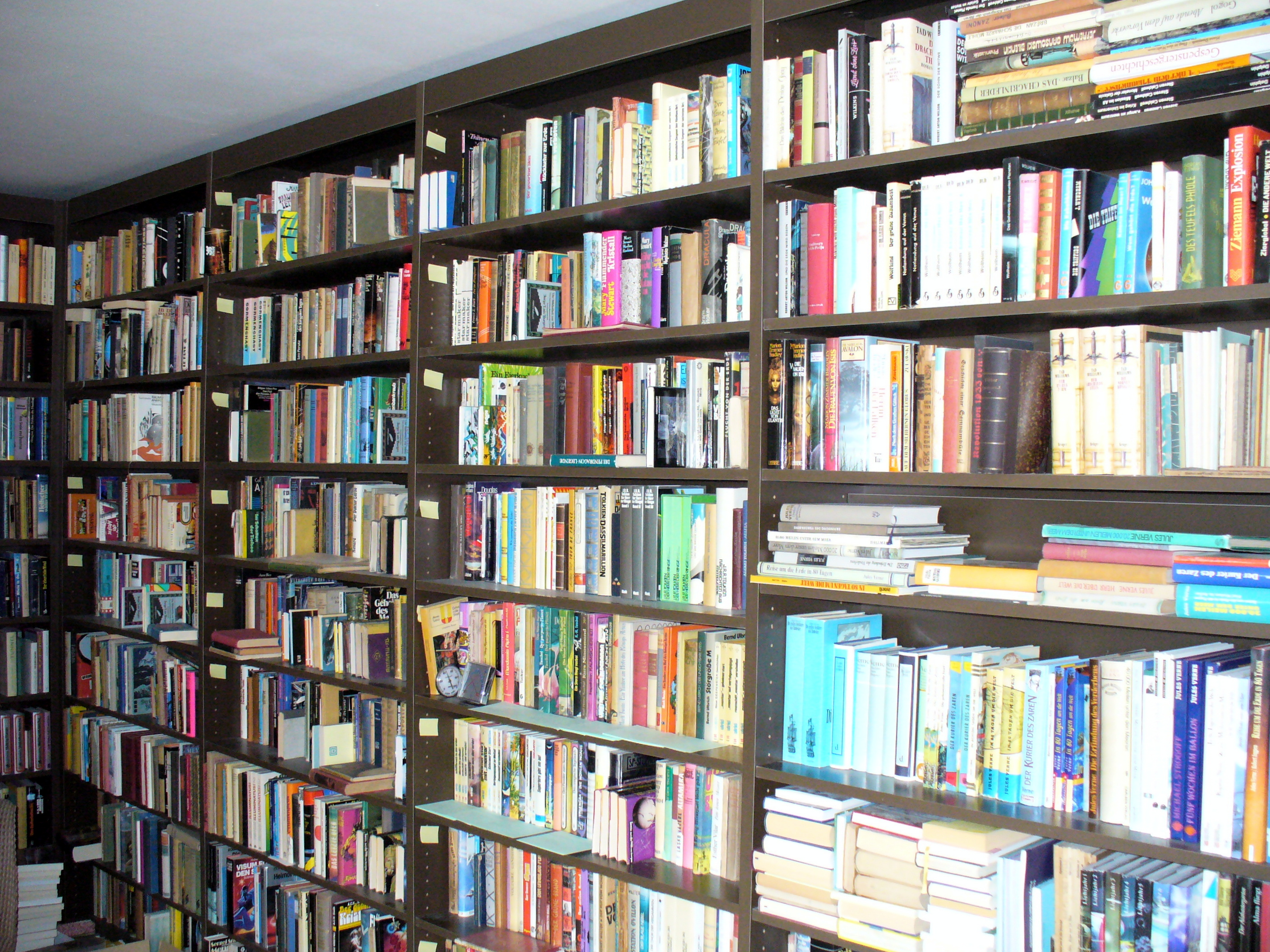 Sehr kleiner Ausschnitt der Sammlung von Wolfgang Thadewald (1936–2014), deutscher Jules Verne-Experte.